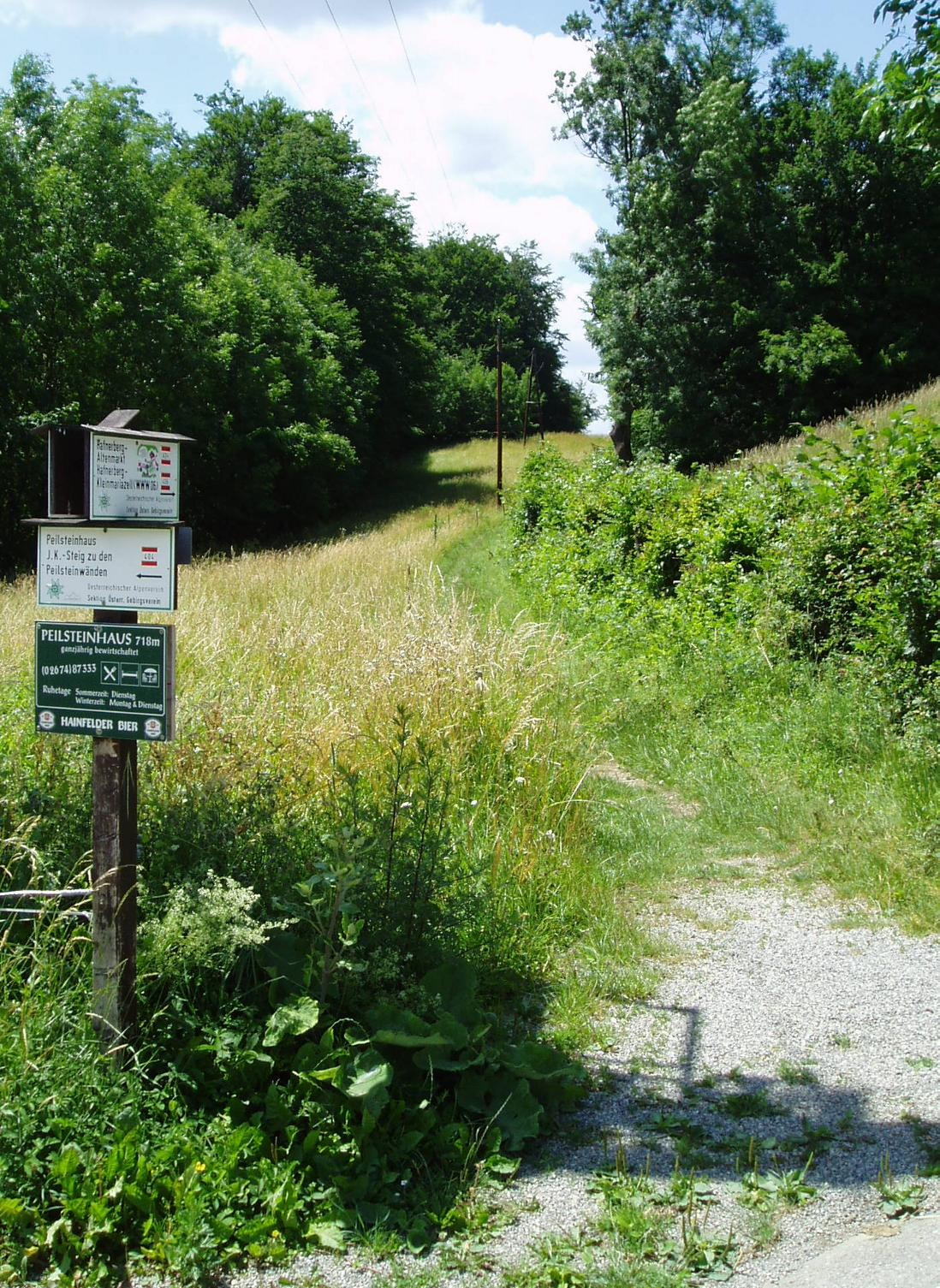 Wanderweg und Wegweiser auf einem Bergsattel bei Maria Raisenmarkt-Holzschlag.